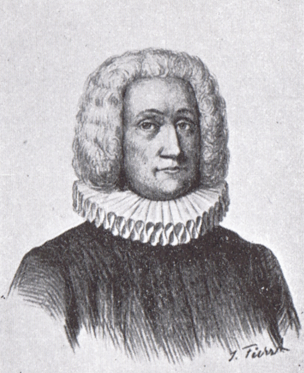 Petersen, Balthasar (1703-1787), Propst aus Tondern, Zeichnung von Julius Fürst